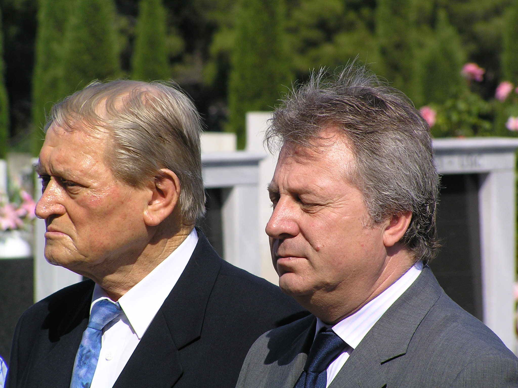 Miho Valić, antifašist i Valter Drandić, gradonačelnik Pule na komemoraciji za pale antifašiste.